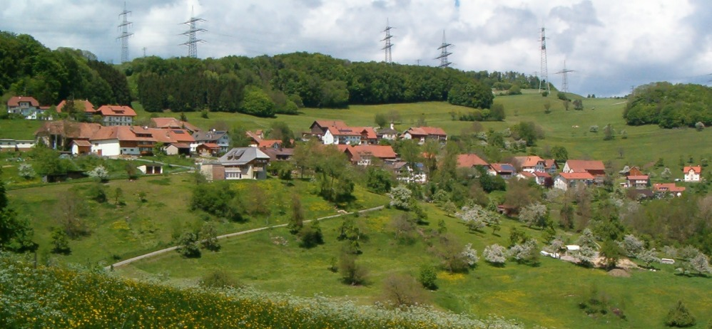 Der Ort Gaiß, westlich des Bergkammes zwischen Lieder- und Seltenbach, Ortsteil der Ortschaft Gaiß-Waldkirch.